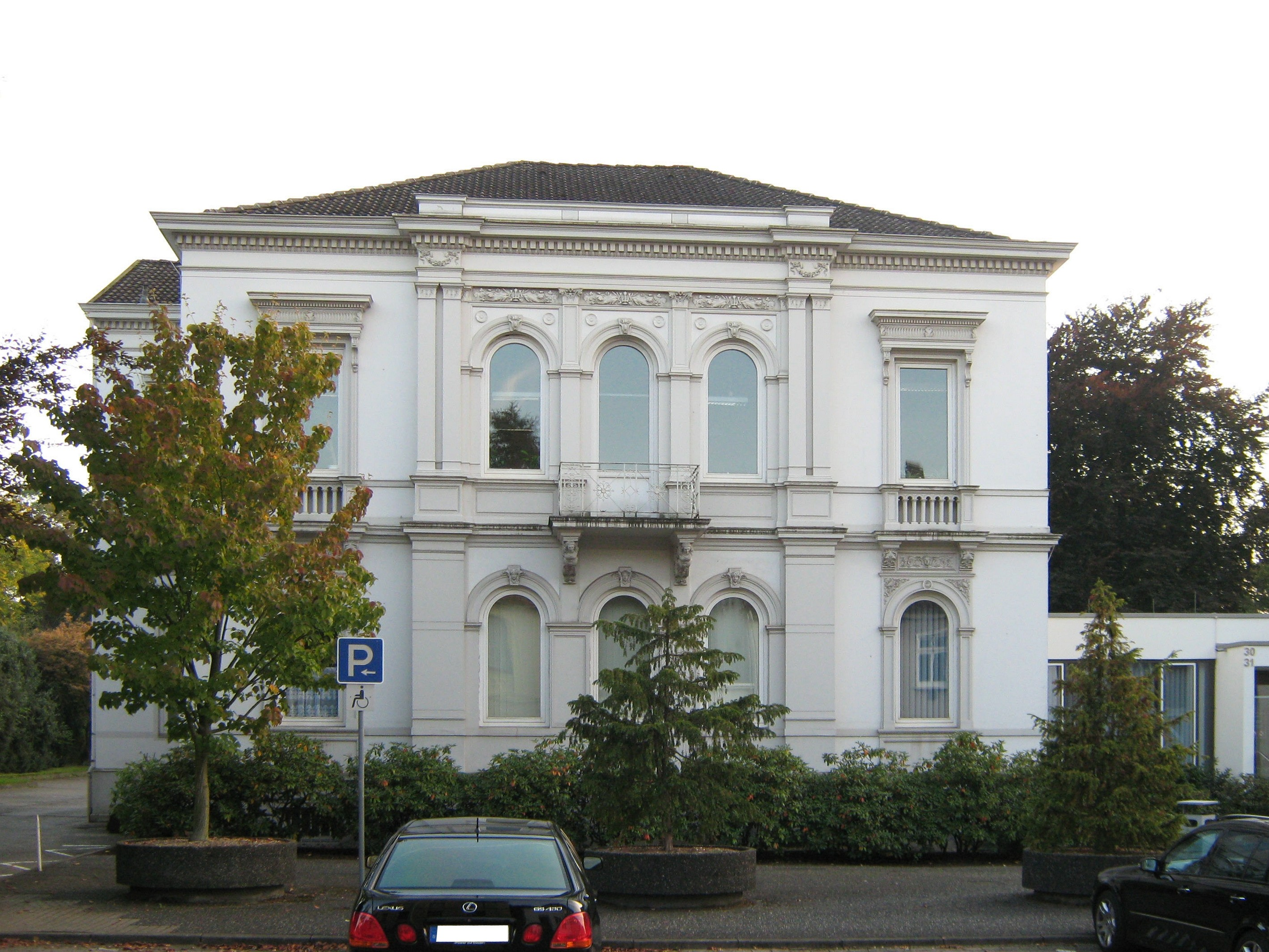 Der Niedersächsische Staatsgerichtshof ist das 1951 gegründete Landesverfassungsgericht des Landes Niedersachsen in Bückeburg